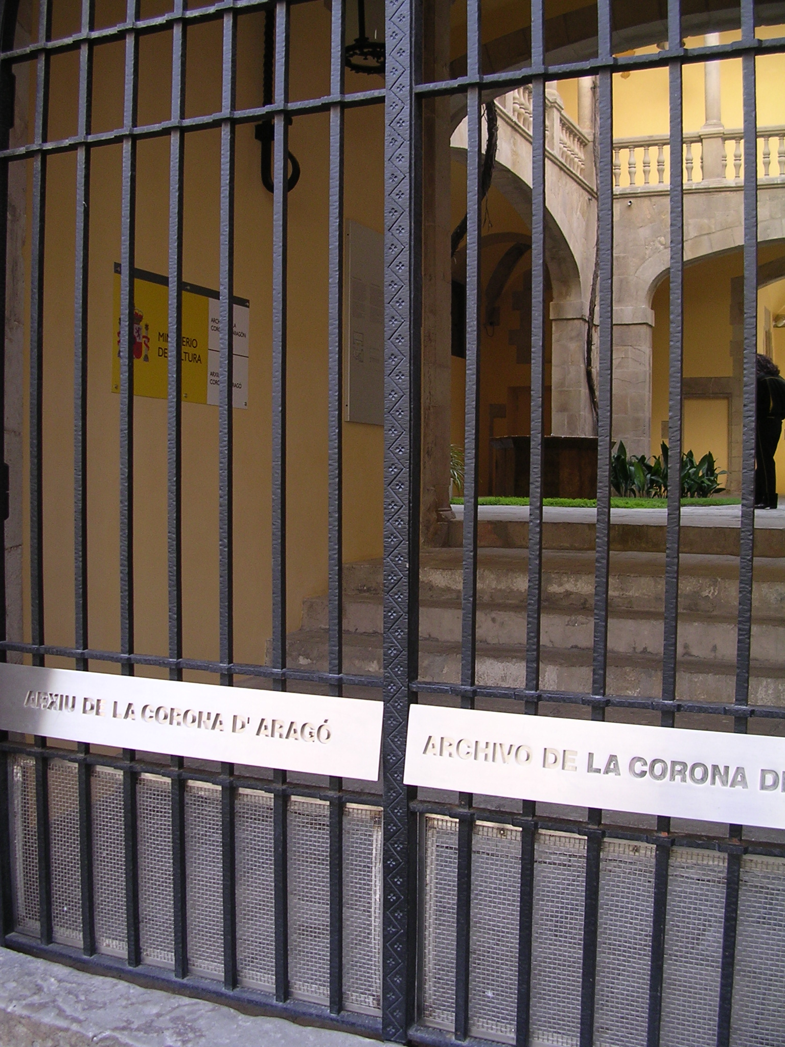 Aragonés: Puertas de l'Archibo d'a Corona d'Aragón en a Plaza d'o Rei, Barzelona